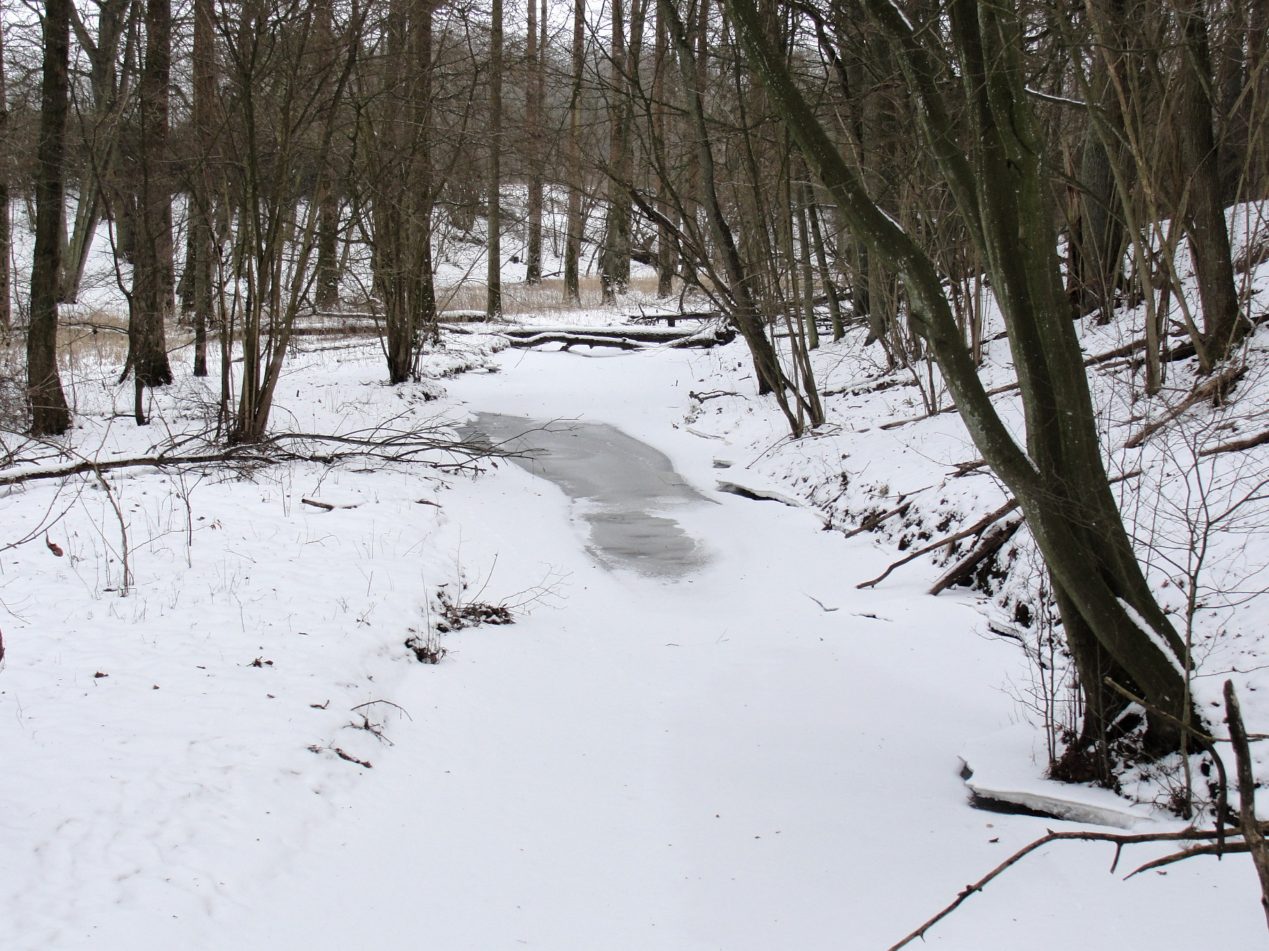 Der Freudenbach in der Prignitz liegt im Winter unter Eis und Schnee.